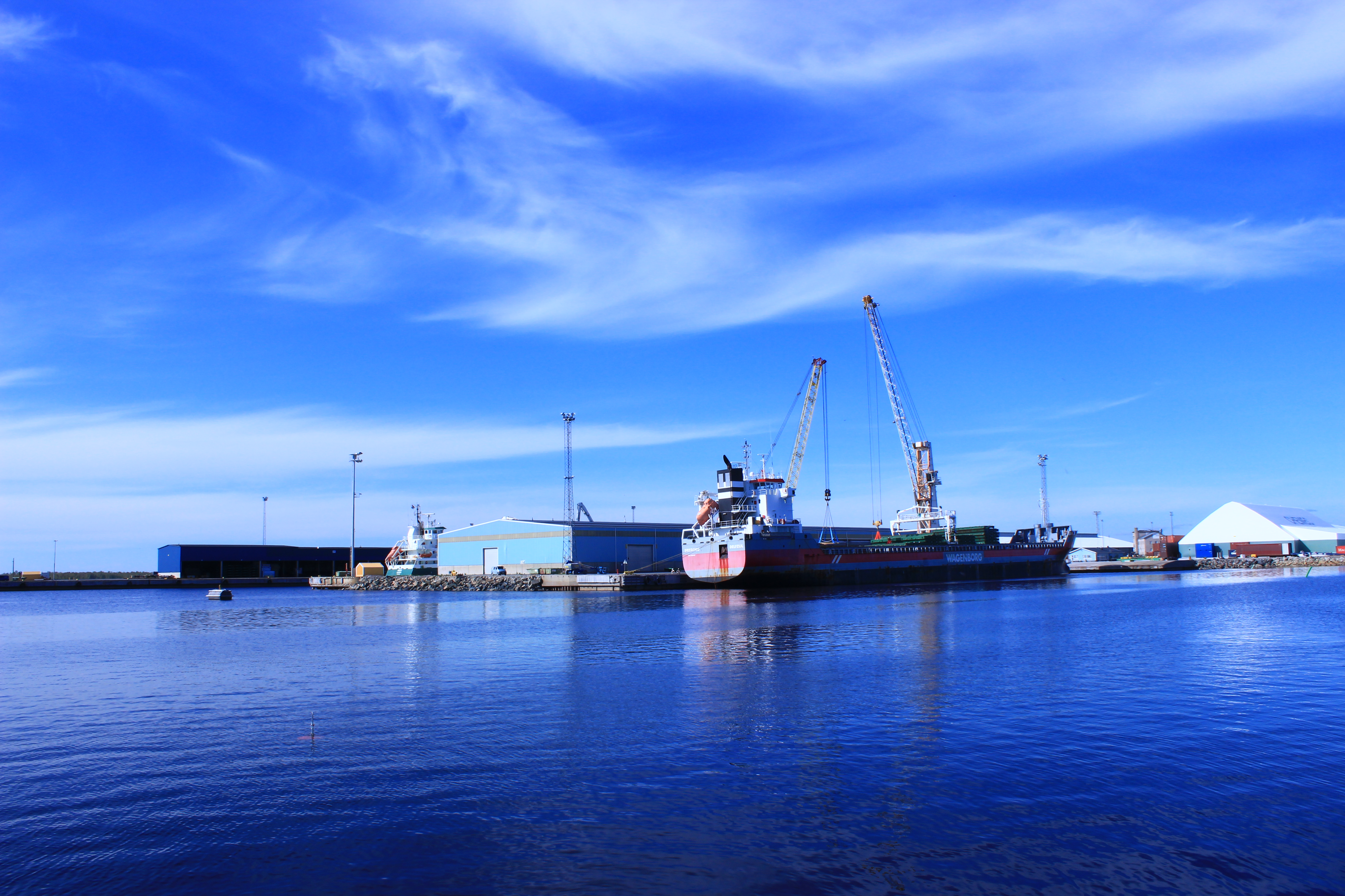 Kemin satama kesällä 2014.